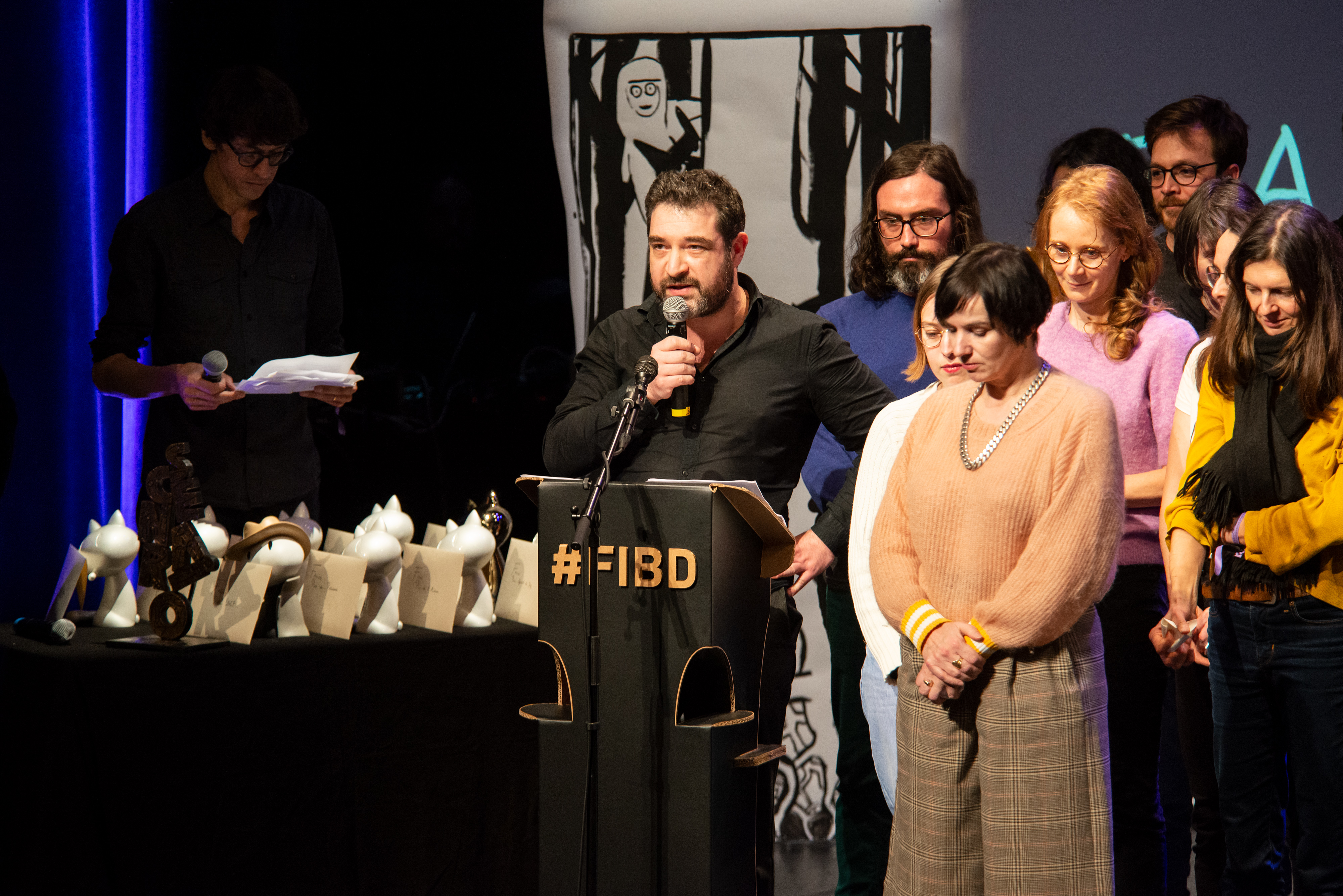 Discours de Gwen de Bonneval - Cérémonie des Fauves, Festival International de la Bande Dessinée d'Angoulême 2020.